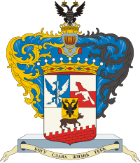 Герб рода графа Бобринского